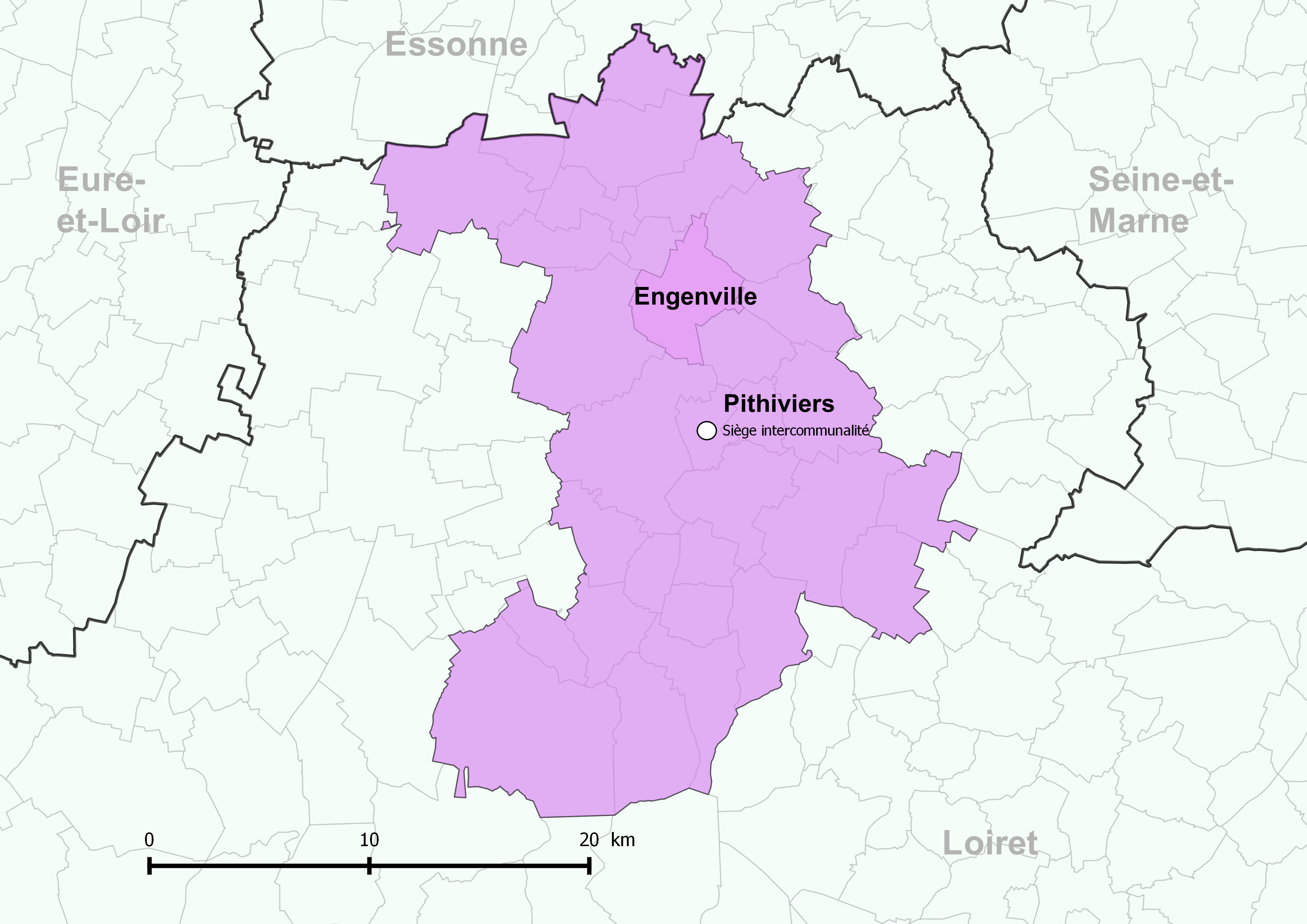 Périmètre de la communauté de communes du Pithiverais - Positionnement de la commune d'Engenville.